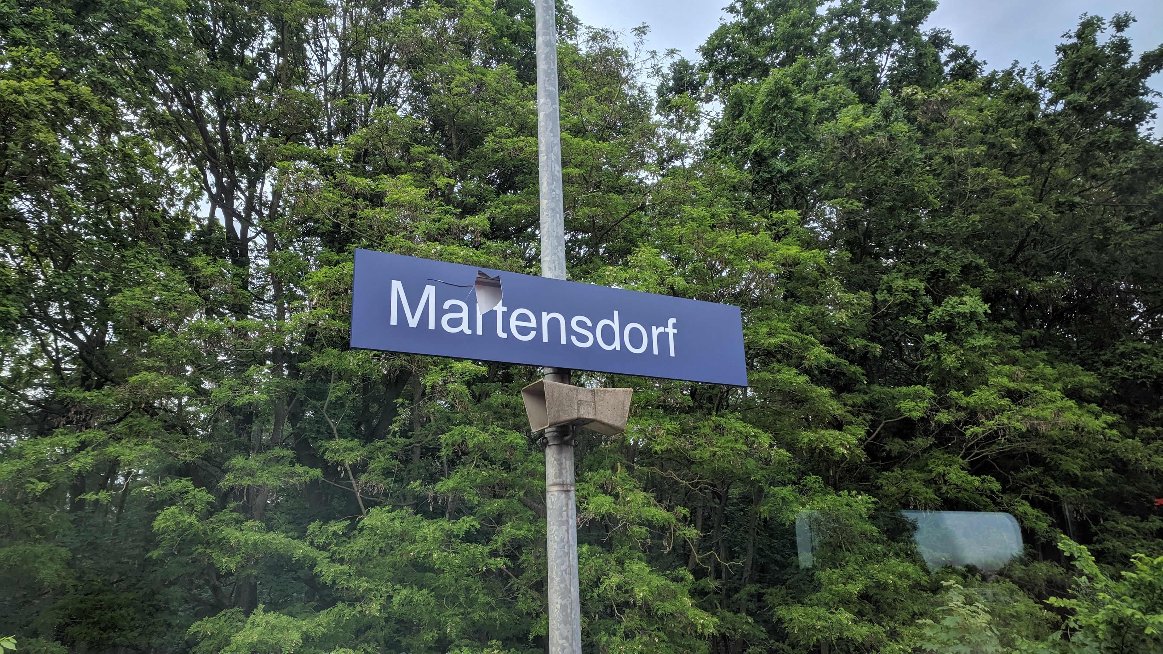 Bahnhofsschild Martensdorf , Taken on 3 June 2019